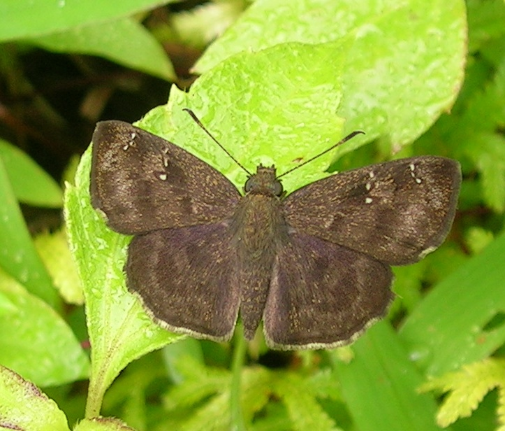 Common Spotted Flat (Sarangesa dasahara), Hesperiidae, North Wayanad, Kerala. See Sarangesa dasahara on english Wikipedia.